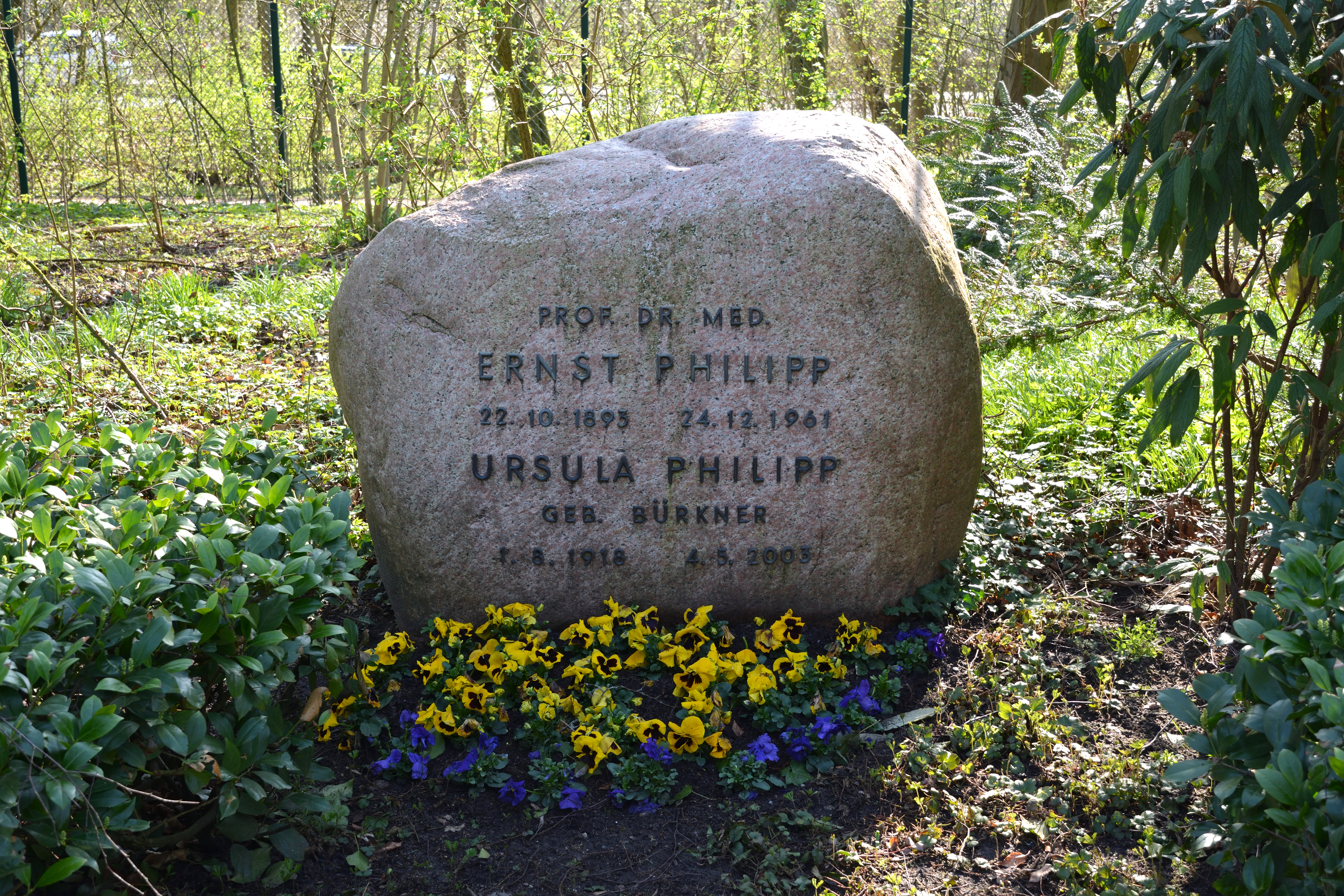 Impressionen vom Nordfriedhof in Kiel: Grab von Ernst Philipp